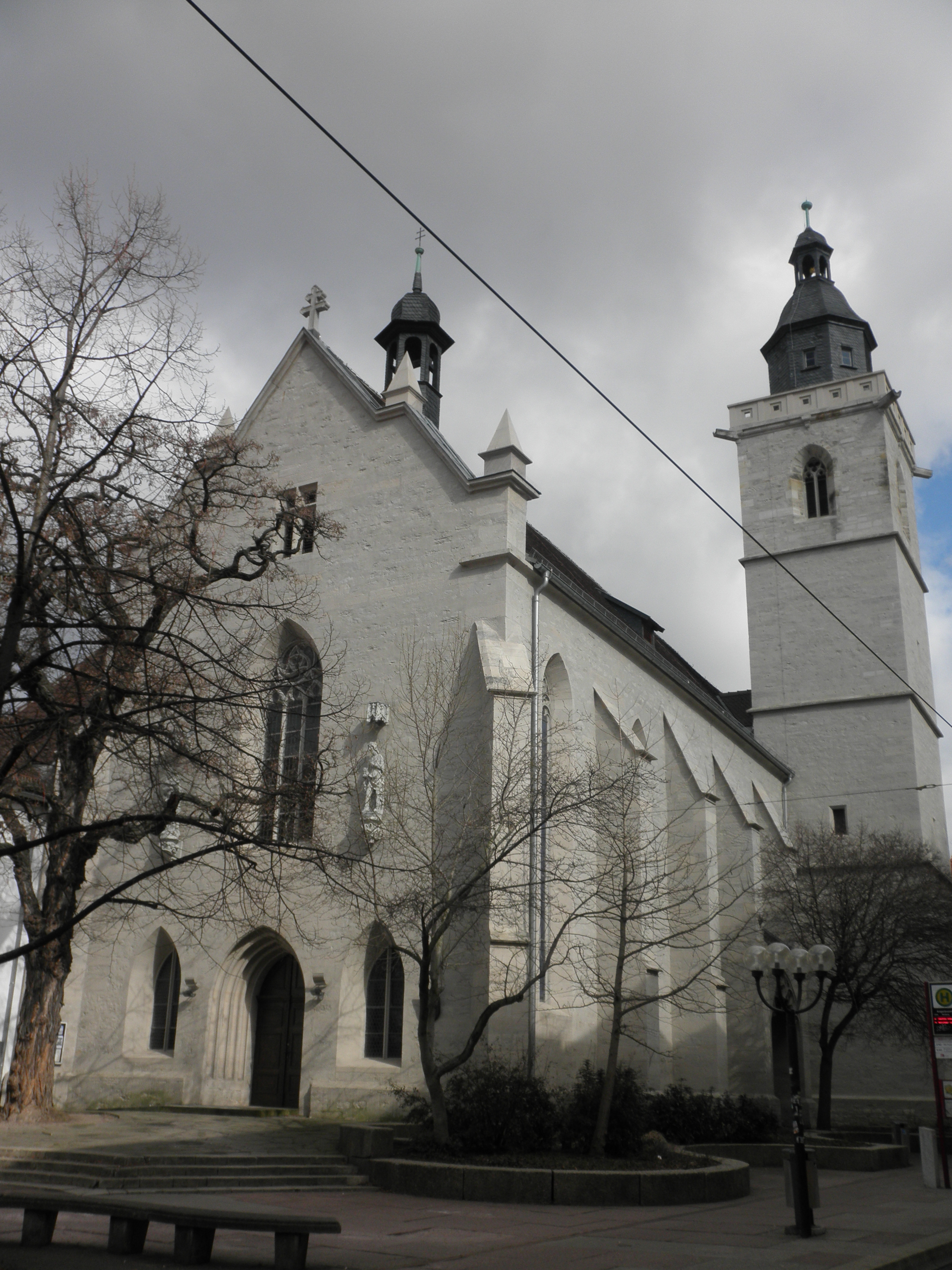 Denkmalschild